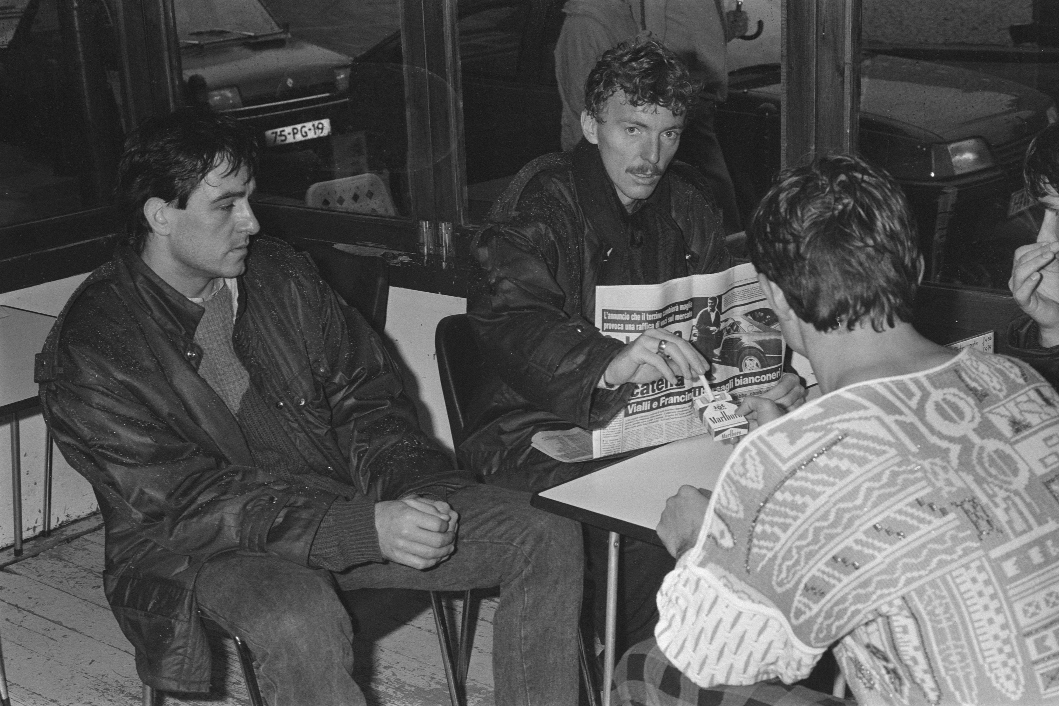 Collectie / Archief : Fotocollectie Anefo Reportage / Serie : [ onbekend ] Beschrijving : Spelers Pools nationaal elftal in centrum Amsterdam; Boniek in poffertjeskraam op de Dam Datum : 18 november 1986 Locatie : Amsterdam, Noord-Holland Trefwoorden : SPELERS, centra, elftallen, sport, voetbal Persoonsnaam : boniek Fotograaf : Molendijk, Bart / Anefo Auteursrechthebbende : Nationaal Archief Materiaalsoort : Negatief (zwart/wit) Nummer archiefinventaris : bekijk toegang 2.24.01.05 Bestanddeelnummer : 933-8181